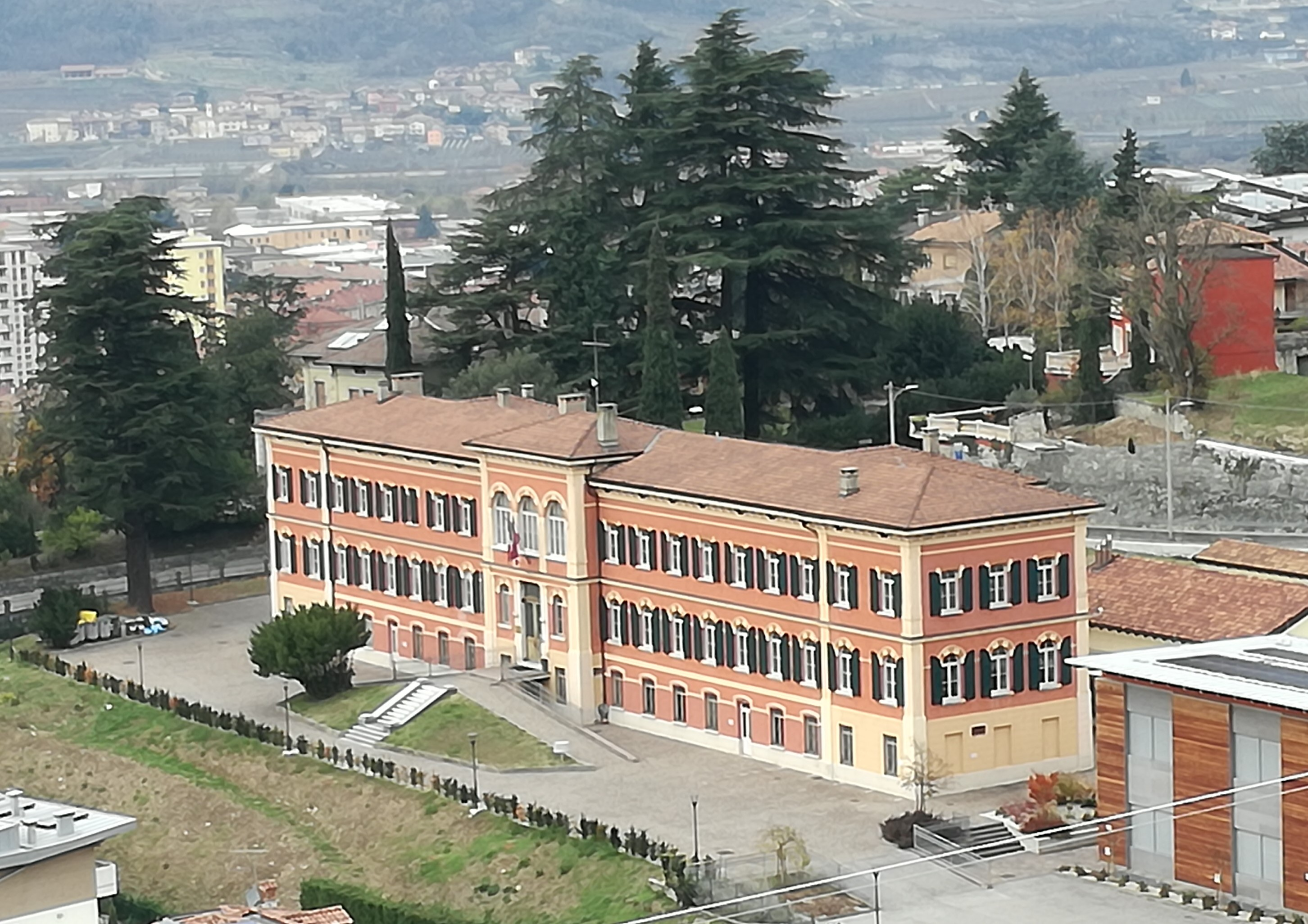 Hotelfachschule Rovereto - ehemals Institut zur Bekämpfung der Pellagra